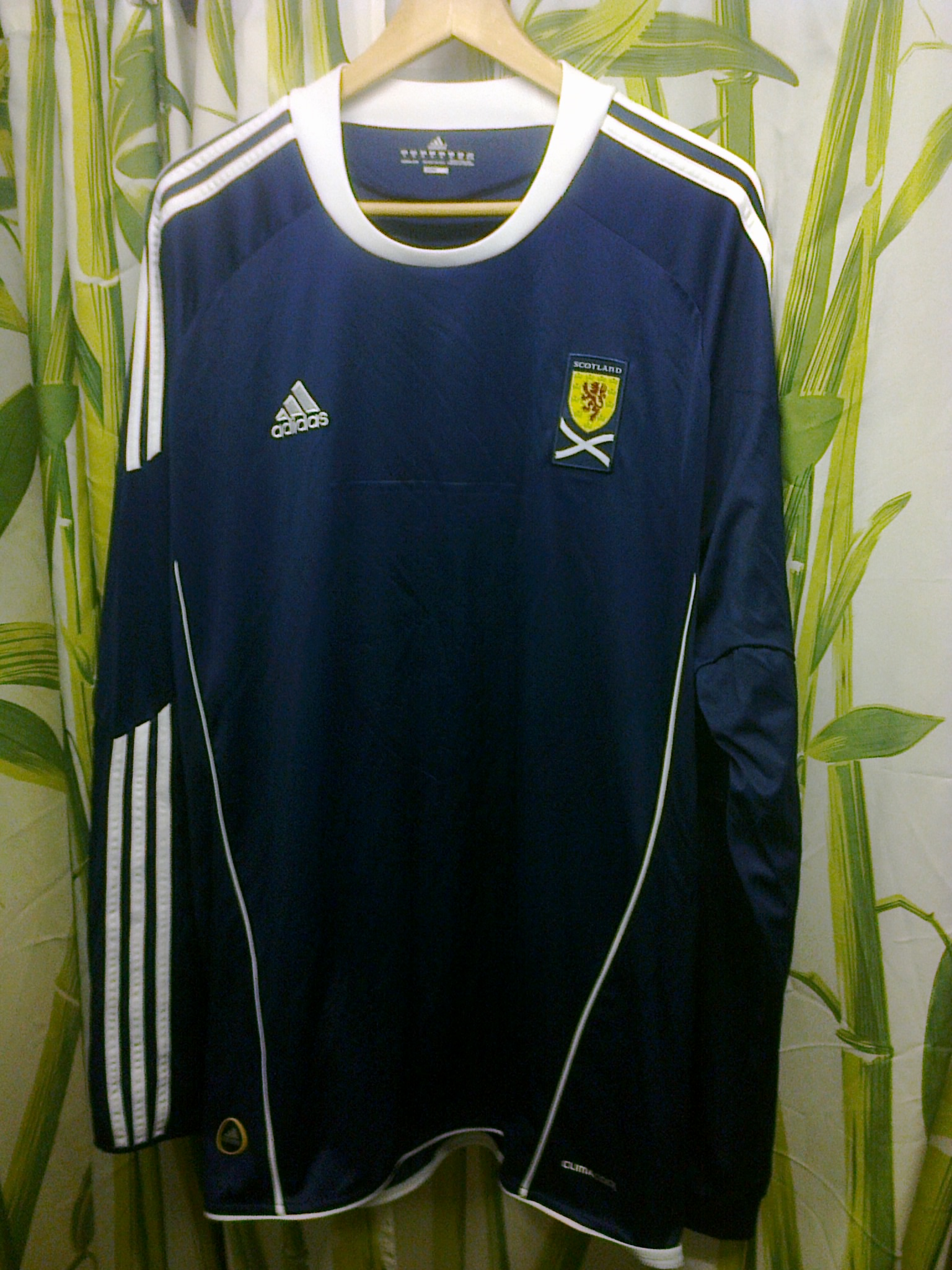 Maillot de l'équipe nationale d'Ecosse (2010 ? 2011 ?)